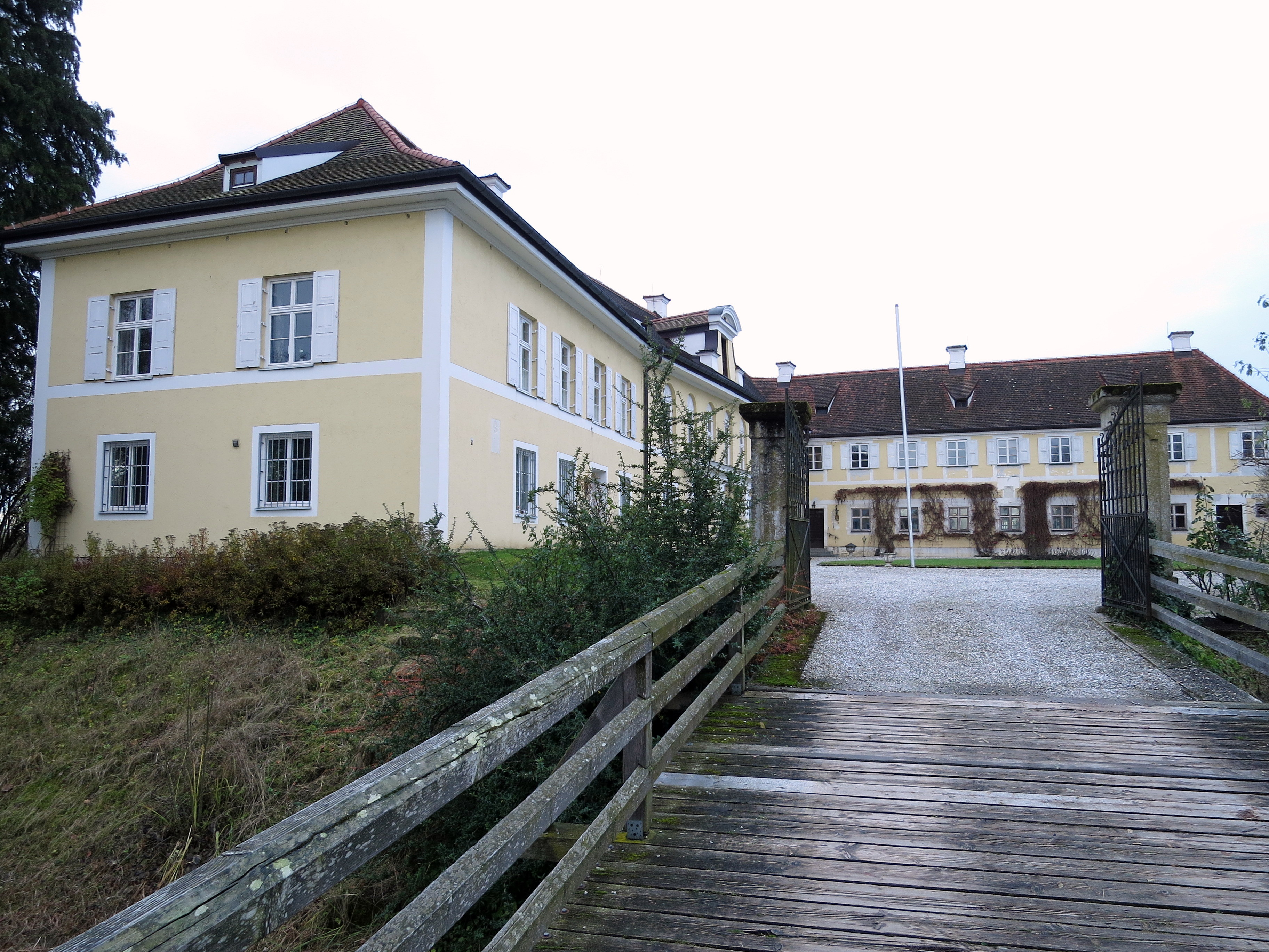 Nur ein Teil des Wasserschlosses ist erhalten